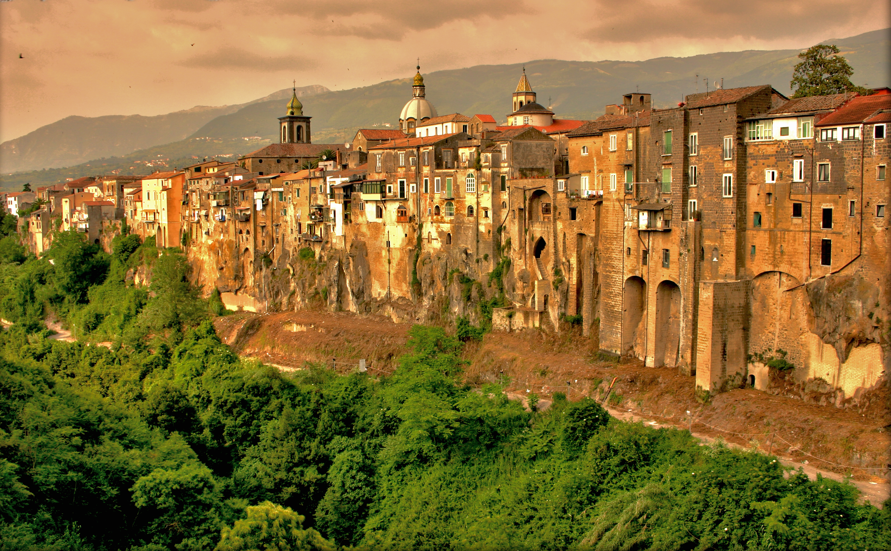 English I liked it very much because it gives me the sense of a Christmas village! And I love Christmas time, as you can see in my photostream. I suggest you to use this ♪♫♪♫ song ♪♫♪♫ as background. Sant'Agata dè Goti ( map ) is an important place of the Italian cultural tourism. Ancient city of the province of Benevento, located on one tuff terrace between two affluents of the Isclero river, Sant'Agata of the Goti is situated in the splendid valley of the Sannio and offers a rich artistic historical patrimony to visit, beyond to typical wine and food products of the zone. The name Sant' Agata dè Goti trace the origin to the VIth century a.C., when the Goti, defeats in the 553 a.C. in the battle of the Vesuvius, obtained to remain in their fortresses as subjects of the empire: a colony of Goti settled down here. _______________________________________________________________________________ Italiano Mi è piaciuto molto perchè mi dà la sensazione e l'atmosfera di un paesaggio natalizio! ed io amo tanto il natale come potete vedere anche dal mio photostream. Vi suggerisco di usare questa ♪♫♪♫ musica ♪♫♪♫ come sottofondo. Sant’Agata dè Goti ( map ) è inserita a pieno titolo tra le mete del turismo culturale Italiano. Antica città della provincia di Benevento, posizionata su una terrazza tufacea tra due affluenti del fiume Isclero, Sant’Agata dei Goti è situata nella splendida valle del Beneventano e offre un ricco patrimonio storico artistico da visitare, oltre a prodotti enogastronomici tipici della zona. Il nome attuale, Sant’Agata dè Goti, risale al sec. VI d.C., quando i Goti, sconfitti nel 553 d.C. nella battaglia del Vesuvio, ottennero di rimanere nelle loro fortezze come sudditi dell’impero: una colonia di Goti si stabilì qui. _______________________________________________________________________________ Best View: On Black